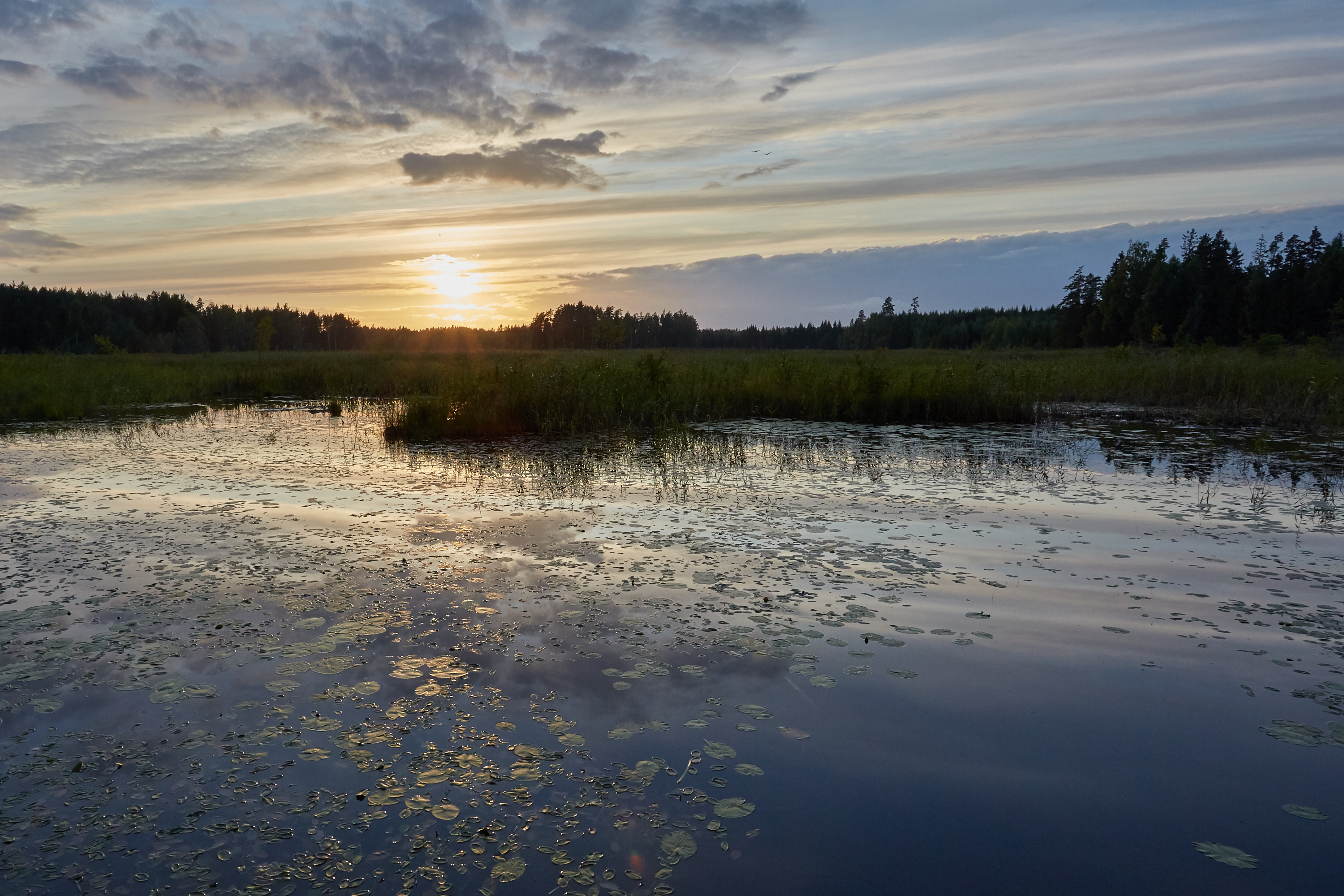 Otitiik Põlva maakonnas Kanepi vallas.